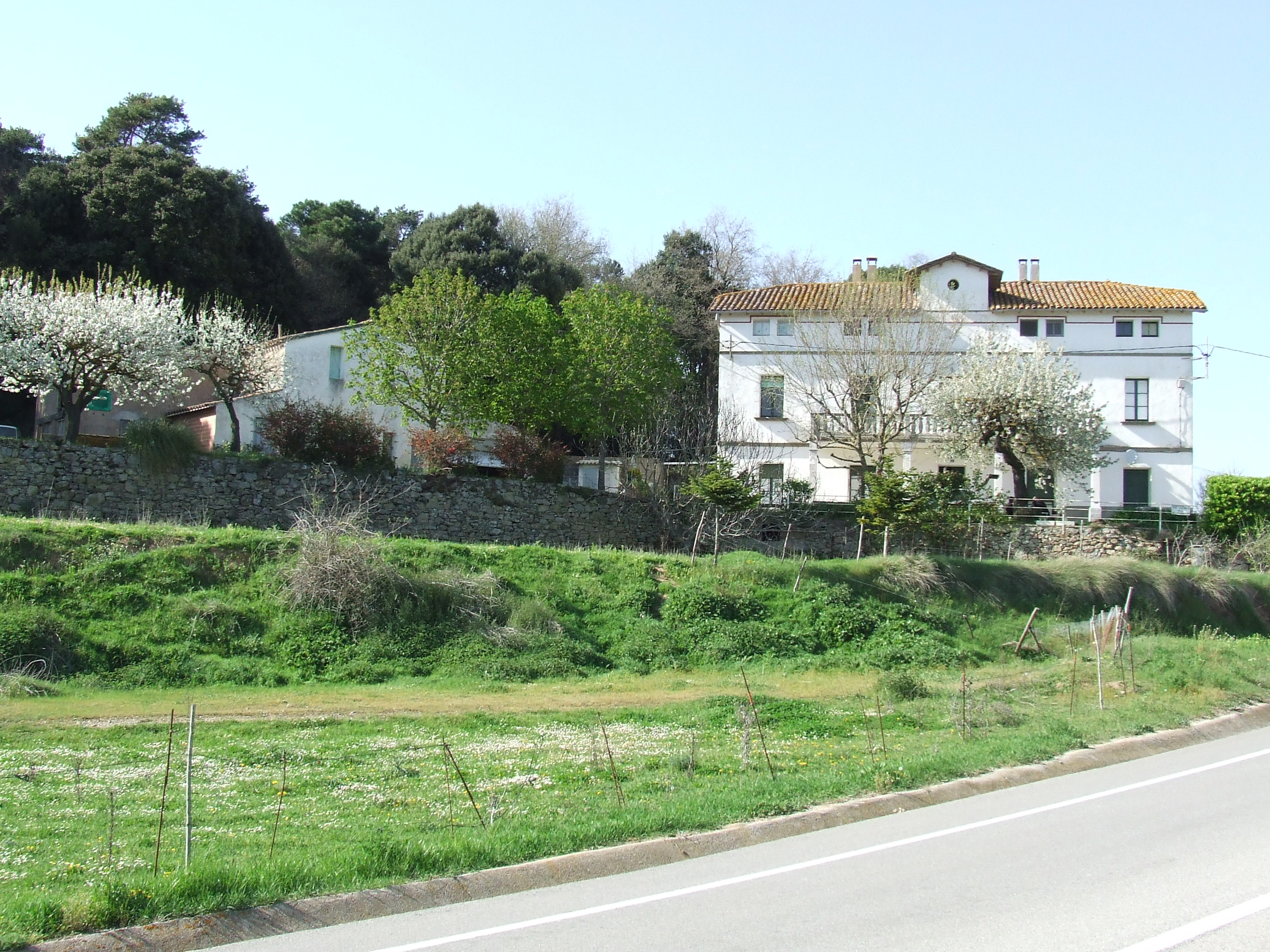 Masia Coll de Poses (Sant Quirze Safaja, Moianès).